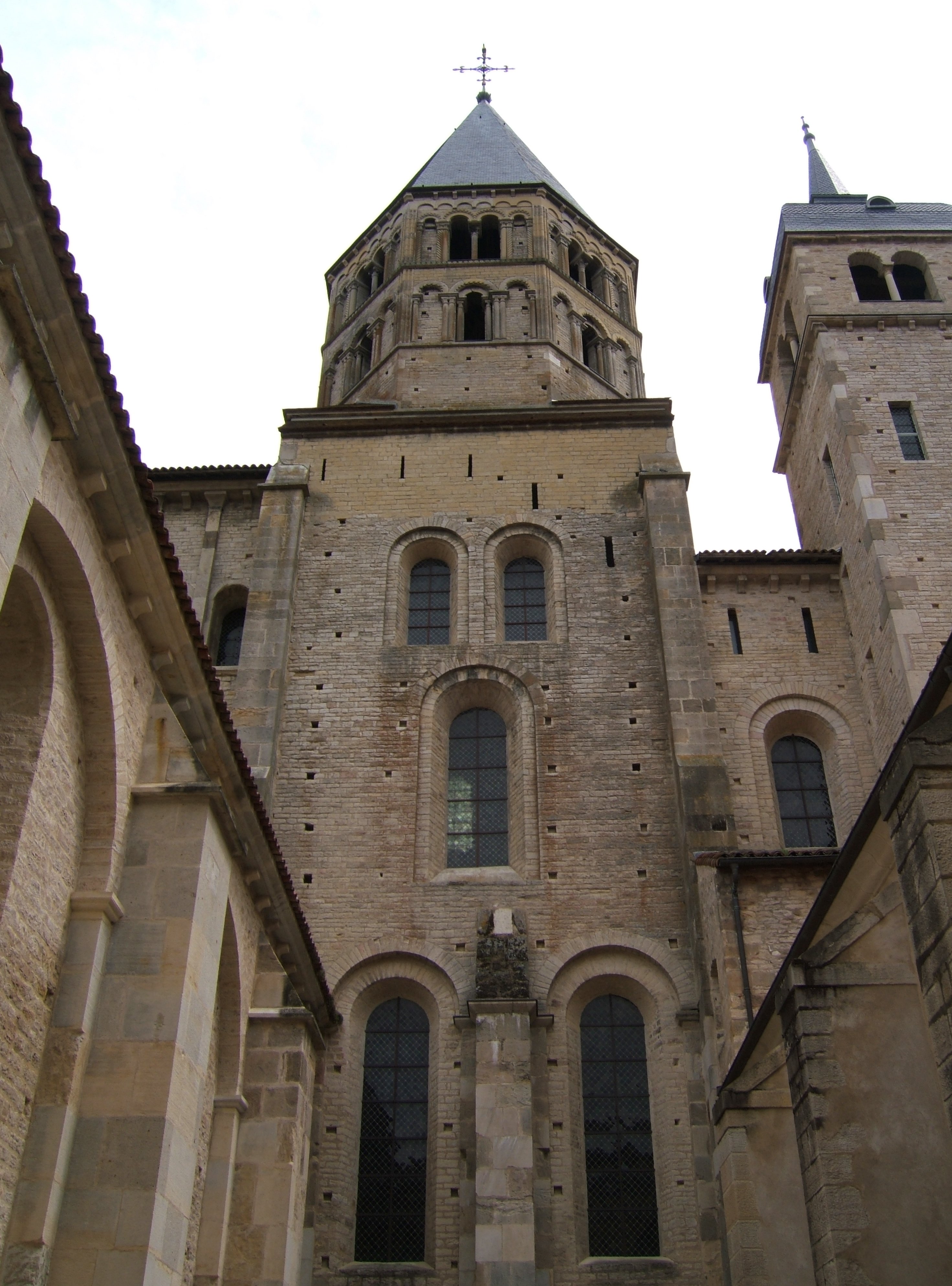 Abbaye de Cluny, Transept